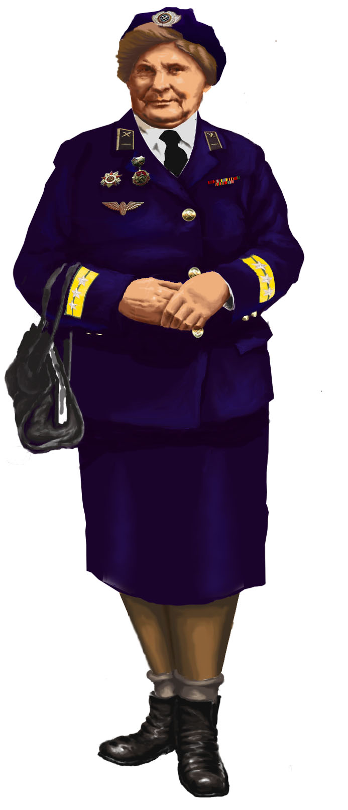 Ревизор пассажирских поездов в зимней форме (средний начсостав). Весна 1985 г. Октябрьская ж,д.